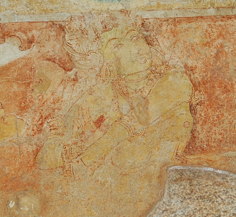 அரிய 7-ஆம் நூற்றாண்டு ஓவியம், சித்தன்ன வாசல், தமிழ்நாடு Rare Seventh Century Painting, Siththana Vasal, Tamil Nadu